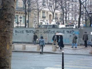 Tags devant la Sorbonne pendant les manifestations anti CPE de mars 2006. Photo personnelle Anne97432